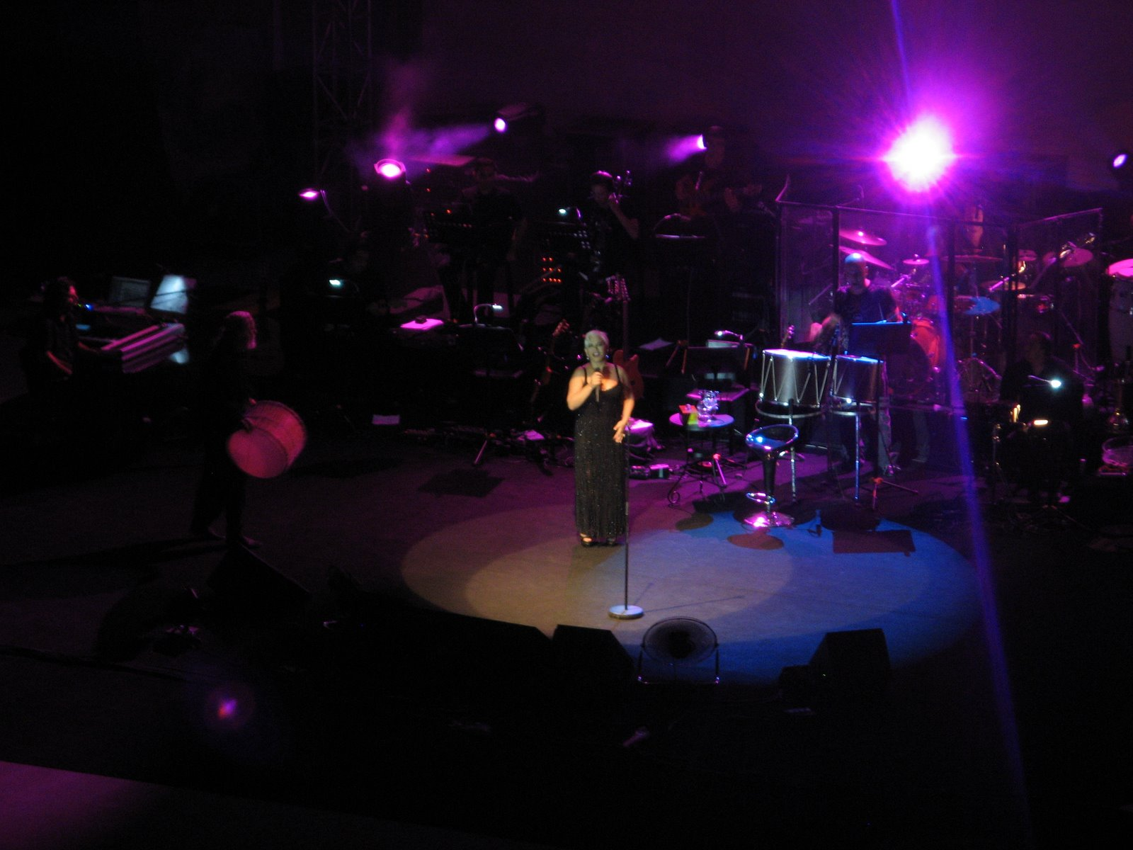 Kendi çekimimden Sezen Aksu konser resmi, Maltepe Üniversitesi (9 Temmuz 2009).